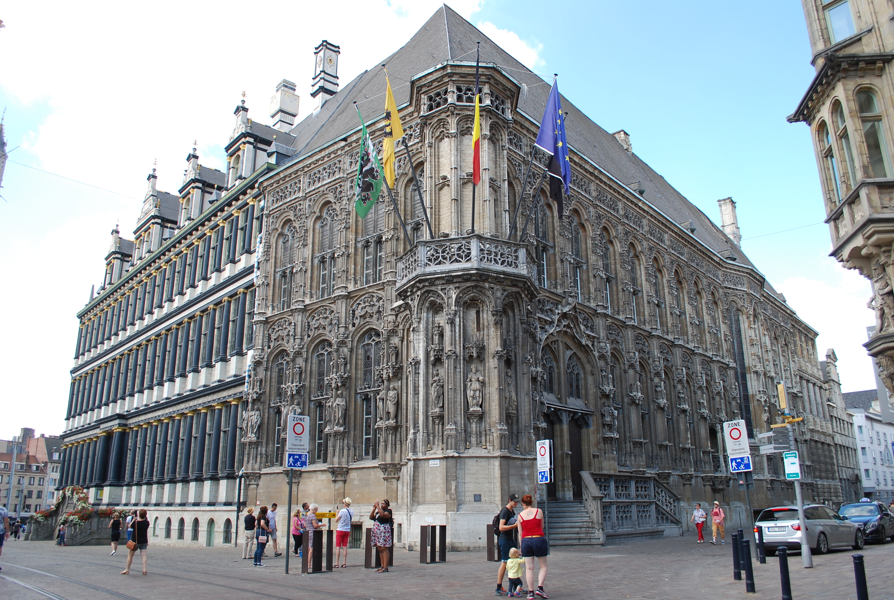 Municipio di Gand This photo of immovable heritage has been taken in the Flemish Region